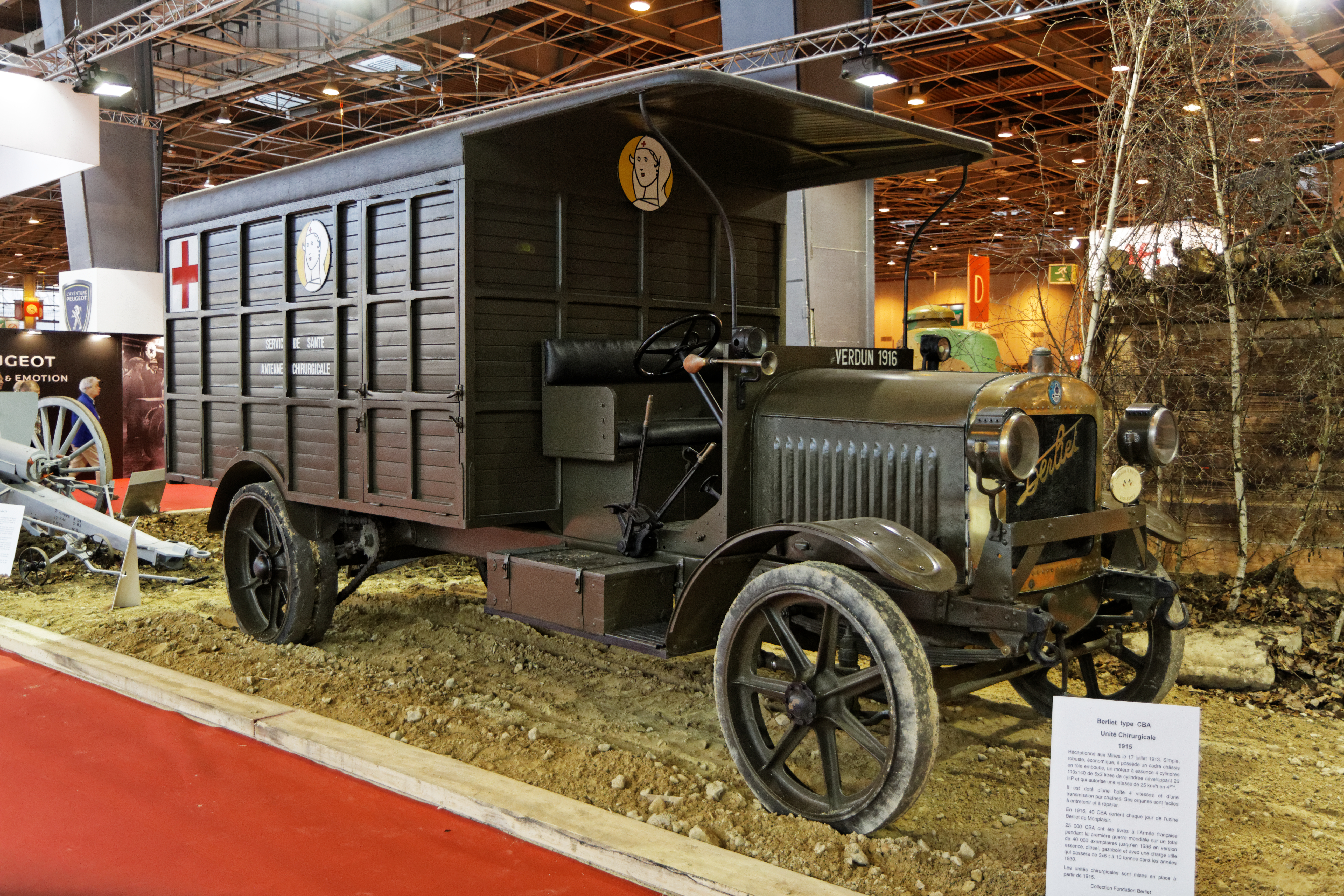 Un Berliet type CBA présenté lors du salon Retromobile 2014.